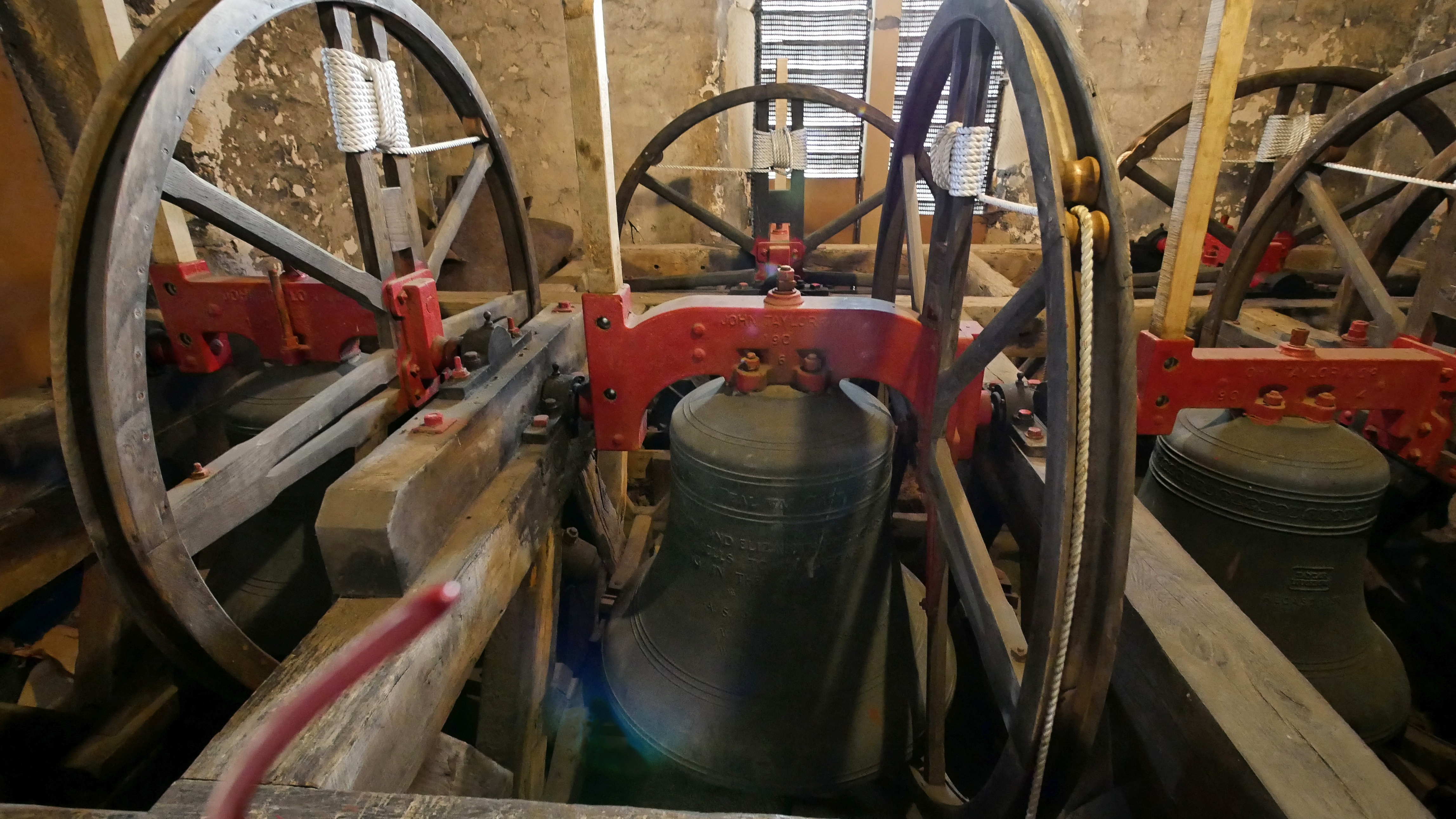 Bells in the Belfry of Kirkbymooreside